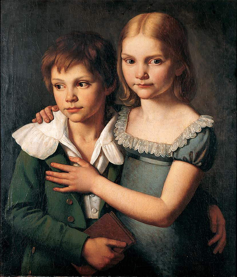 Etienne Maria (1810–1834) und Christine Louise Kolbe (1807–1855), die Kinder des Künstlers